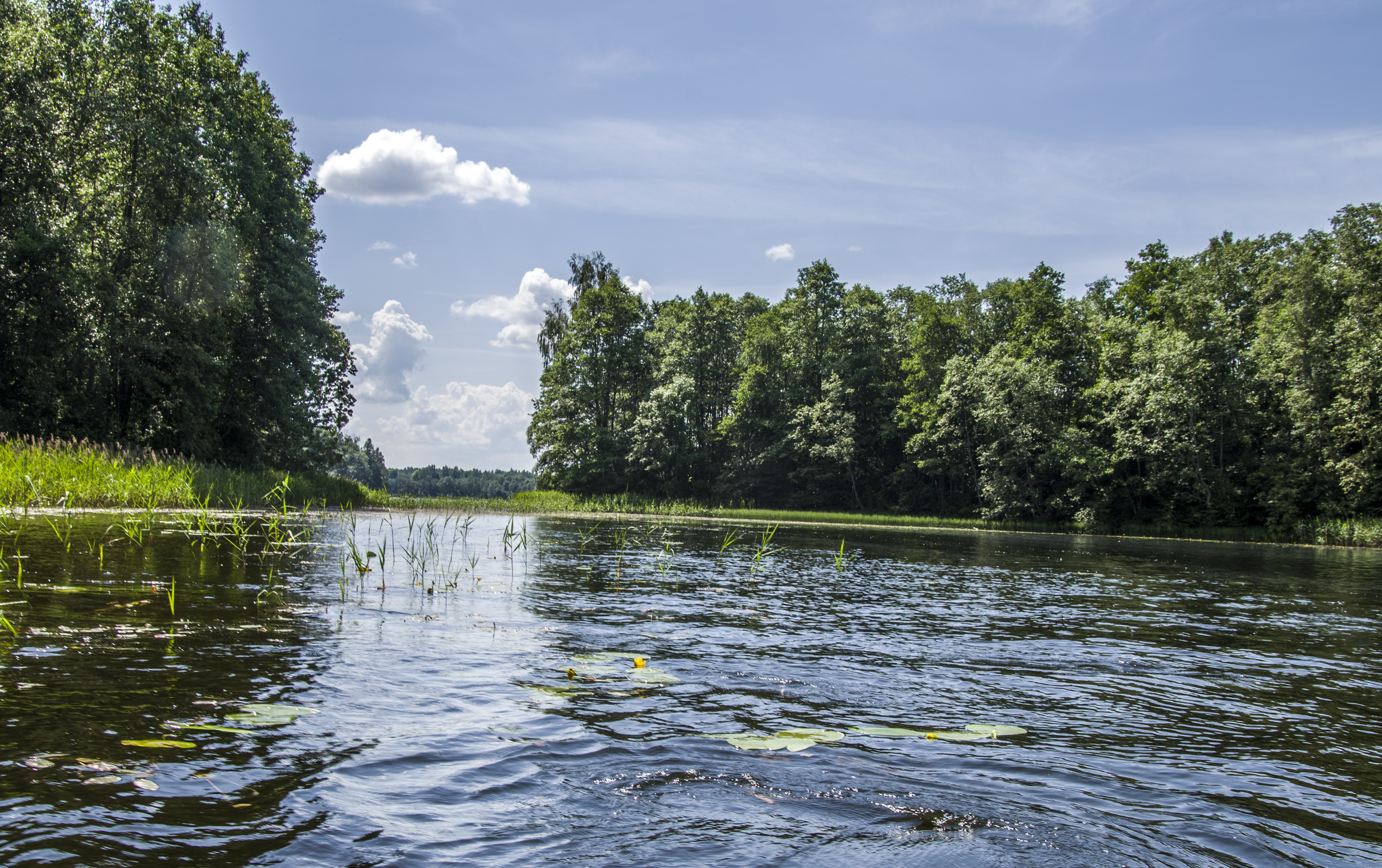 Cārmaņa ezers- sašaurinājums